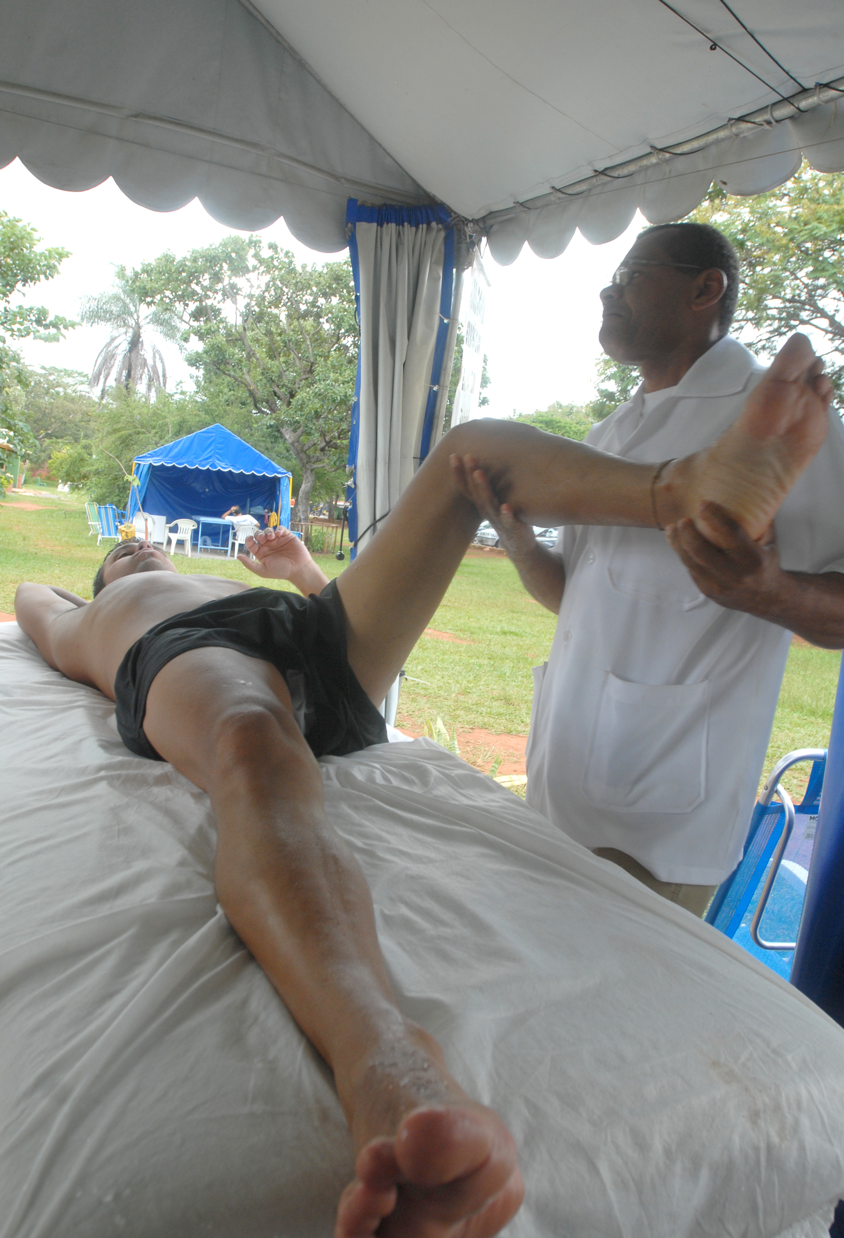 Fisioterapeuta massageia cliente.